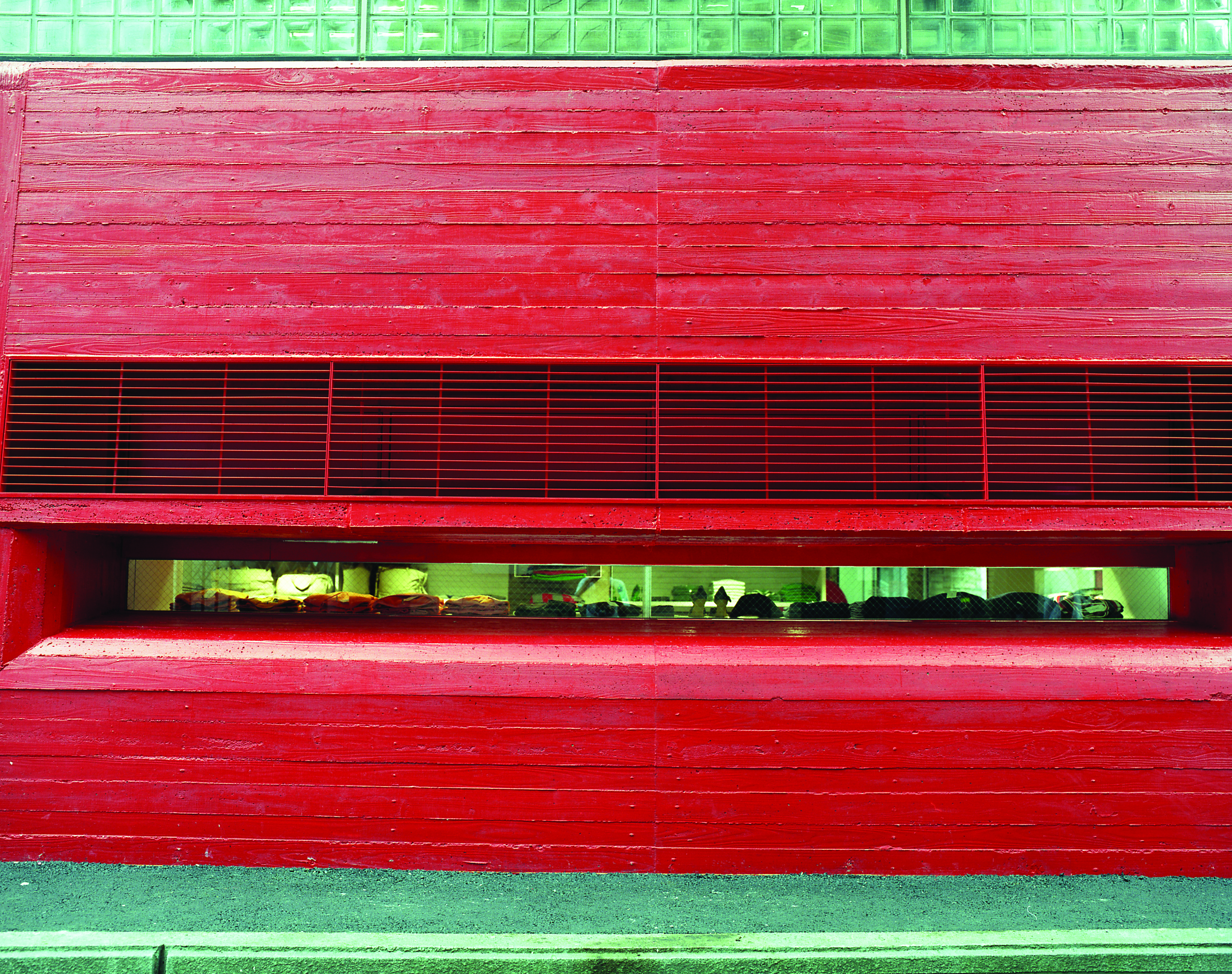 Photo de l'extérieur de la boutique Bali Barret, à Tokyo.